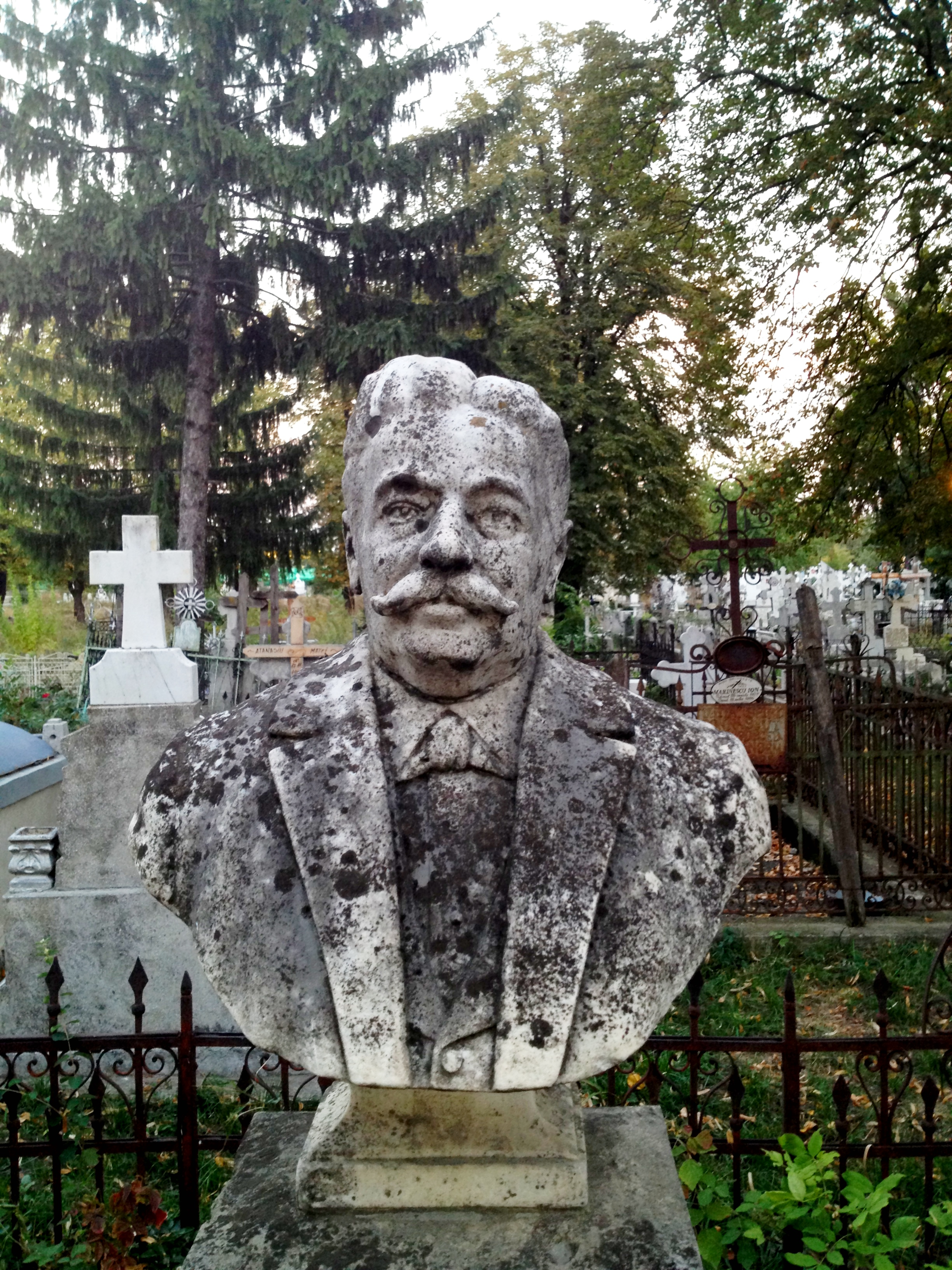 Bustul lui D. Nicolaidi